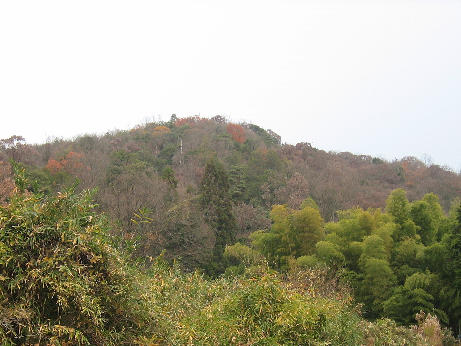 上賀茂神山を登山口から撮影